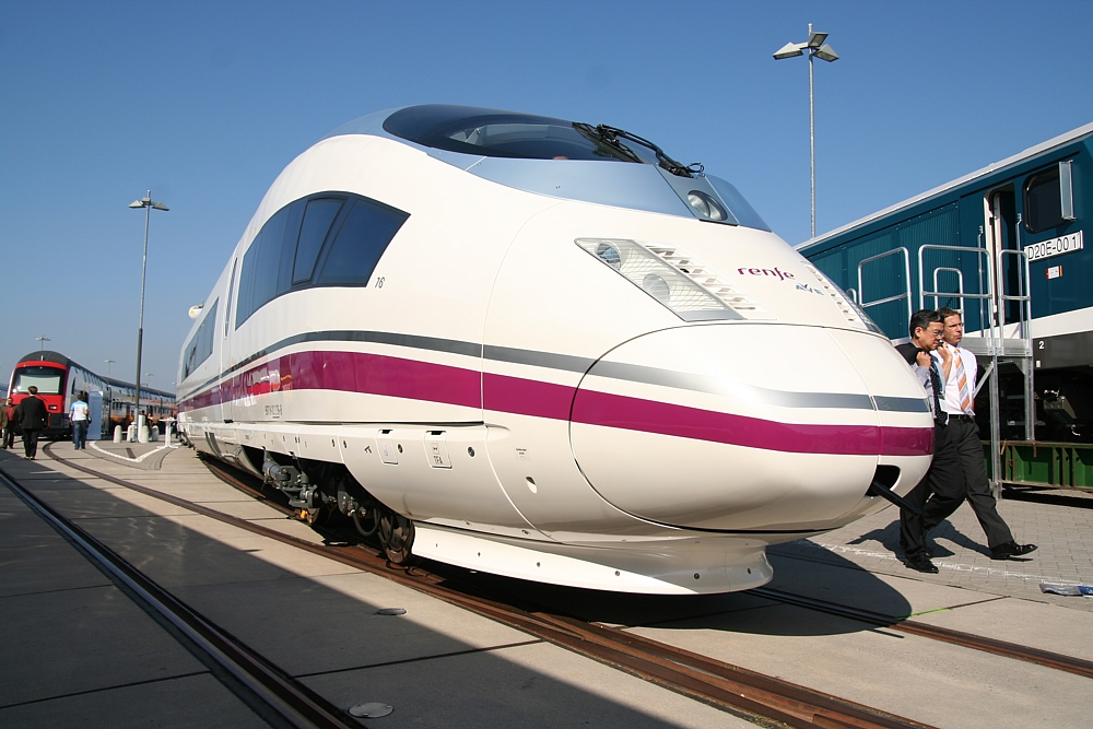 Velaro E von Siemens am 22.09.2006 auf der Innotrans in Berlin.